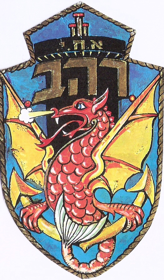 סמלי אוניות חיל הים